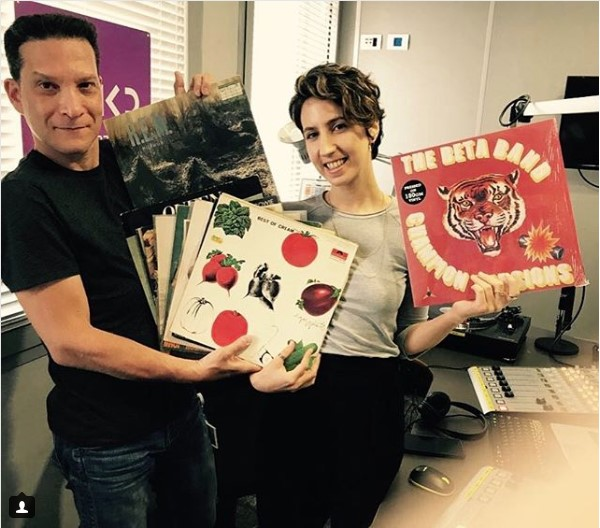 קובי מנורה רותם דויטשר בחגיגות יום התקליט